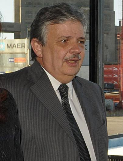 Secretario de Transporte de Argentina, Juan Pablo Schiavi